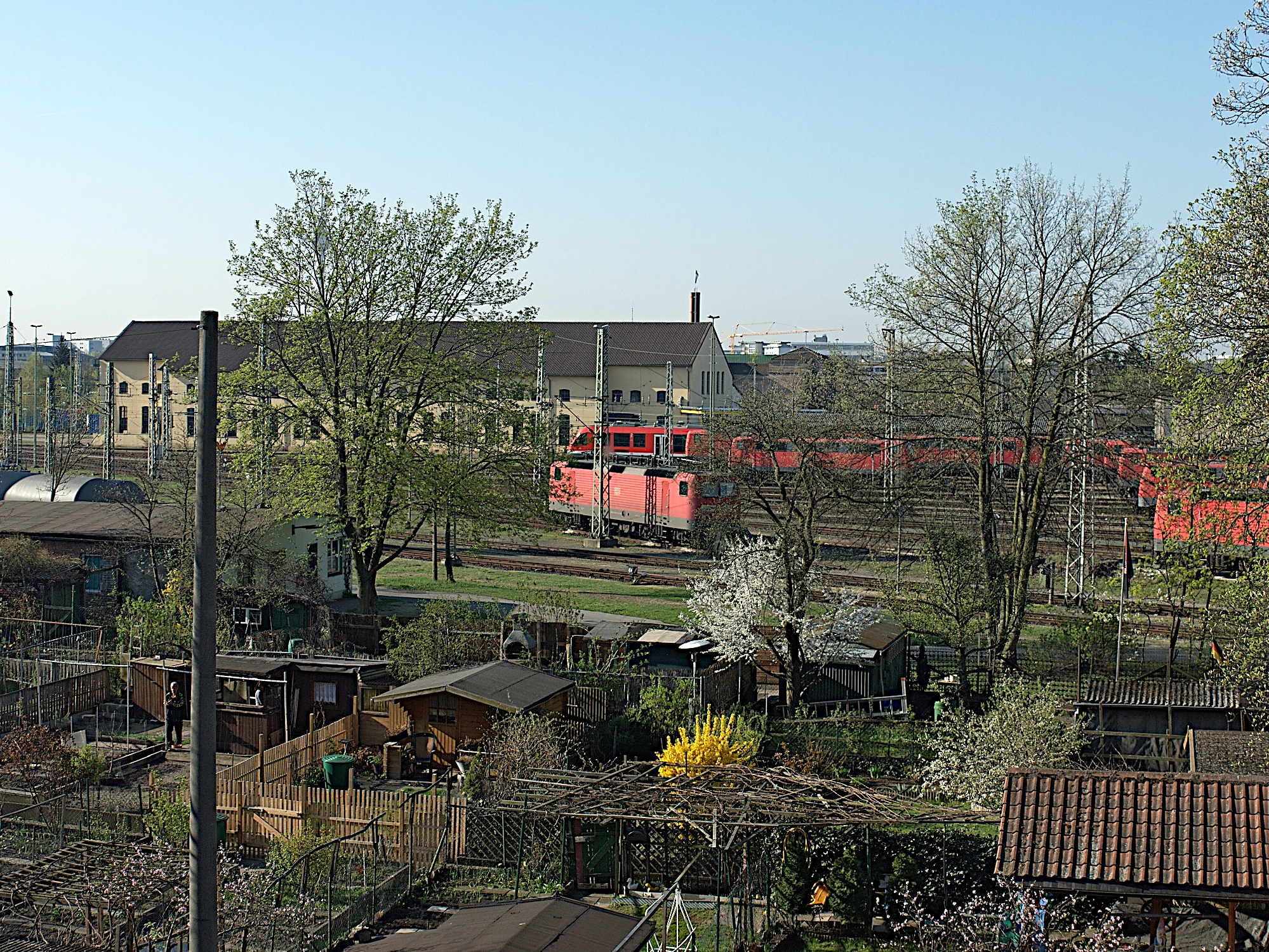 Blick von Norden auf das Bahnbetriebswerk Nürnberg mit Lokomotiven der DBAG-Baureihe 143.